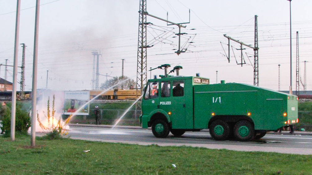 Räumung des Besetzten Hauses in Erfurt am 16.4.09 . Viele Bilder sind Unscharf, da es noch sehr dunkel war & es sehr hektisch war. Sie stehen natürlich unter der CC-Lizenz.